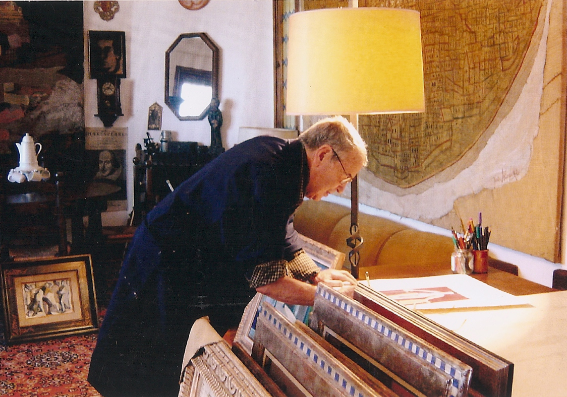 Juan Alcalde en su estudio. Febrero de 2004